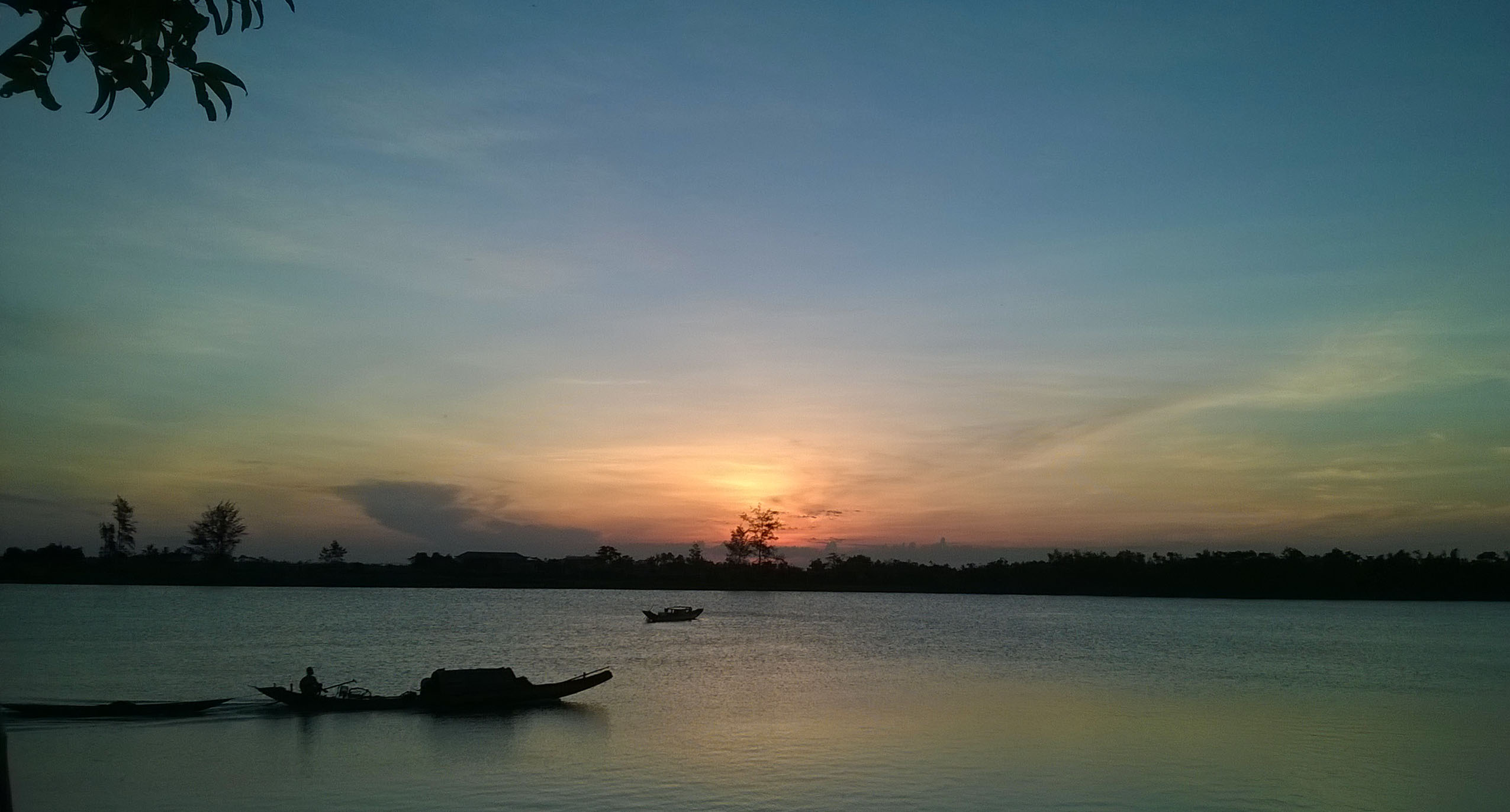 Thạch Hãn River in Dong Ha, Quang Tri Province